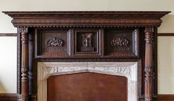 Aelwyd Southover Grange - Llun gyda chaniatâd Carlotta Luke (2016)